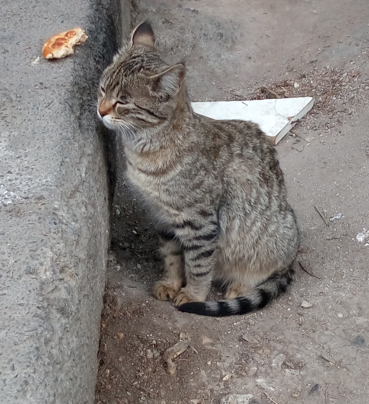 گربه ایرانی